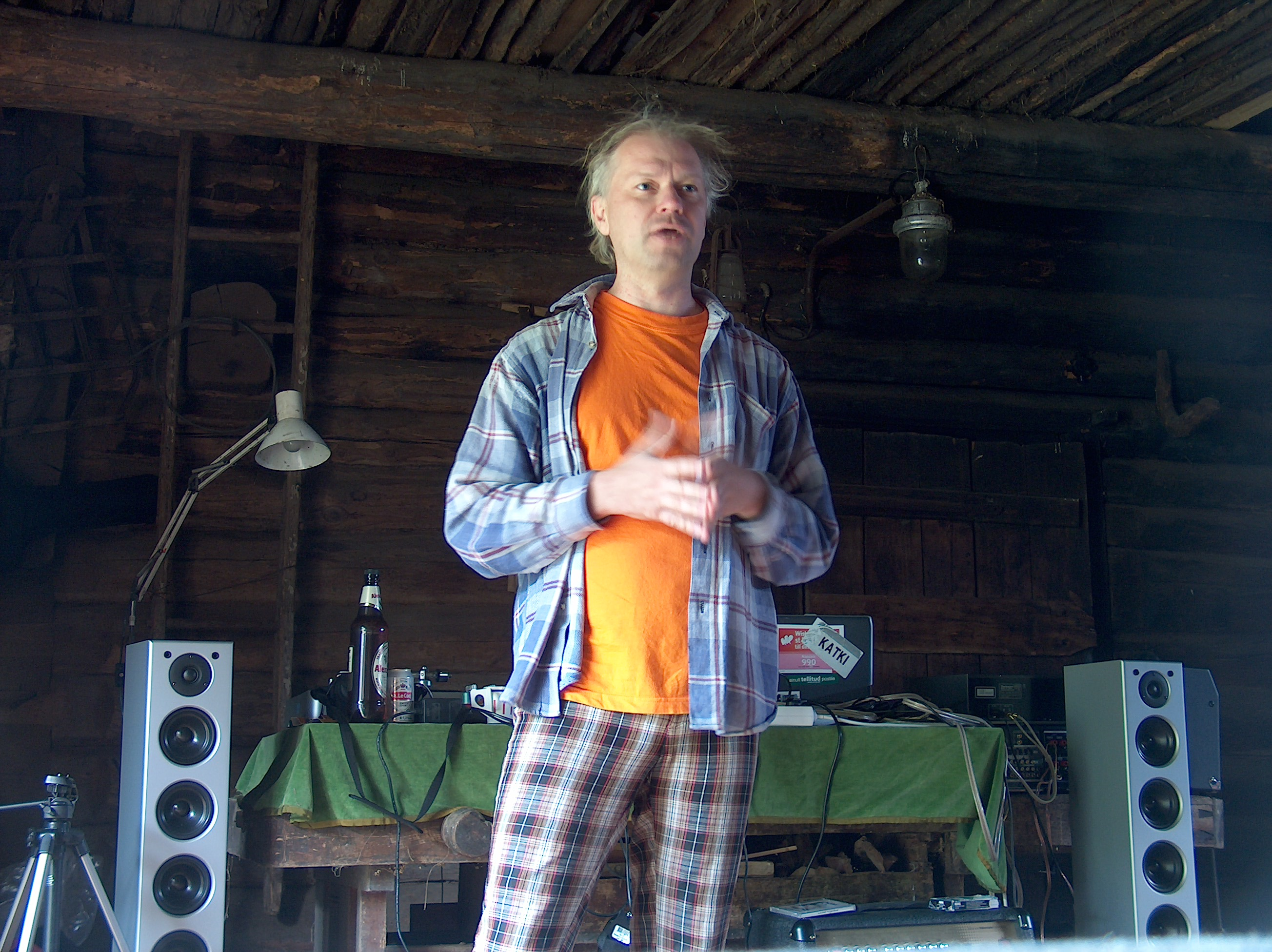 Veiko Märka Lätete Pääl 2007